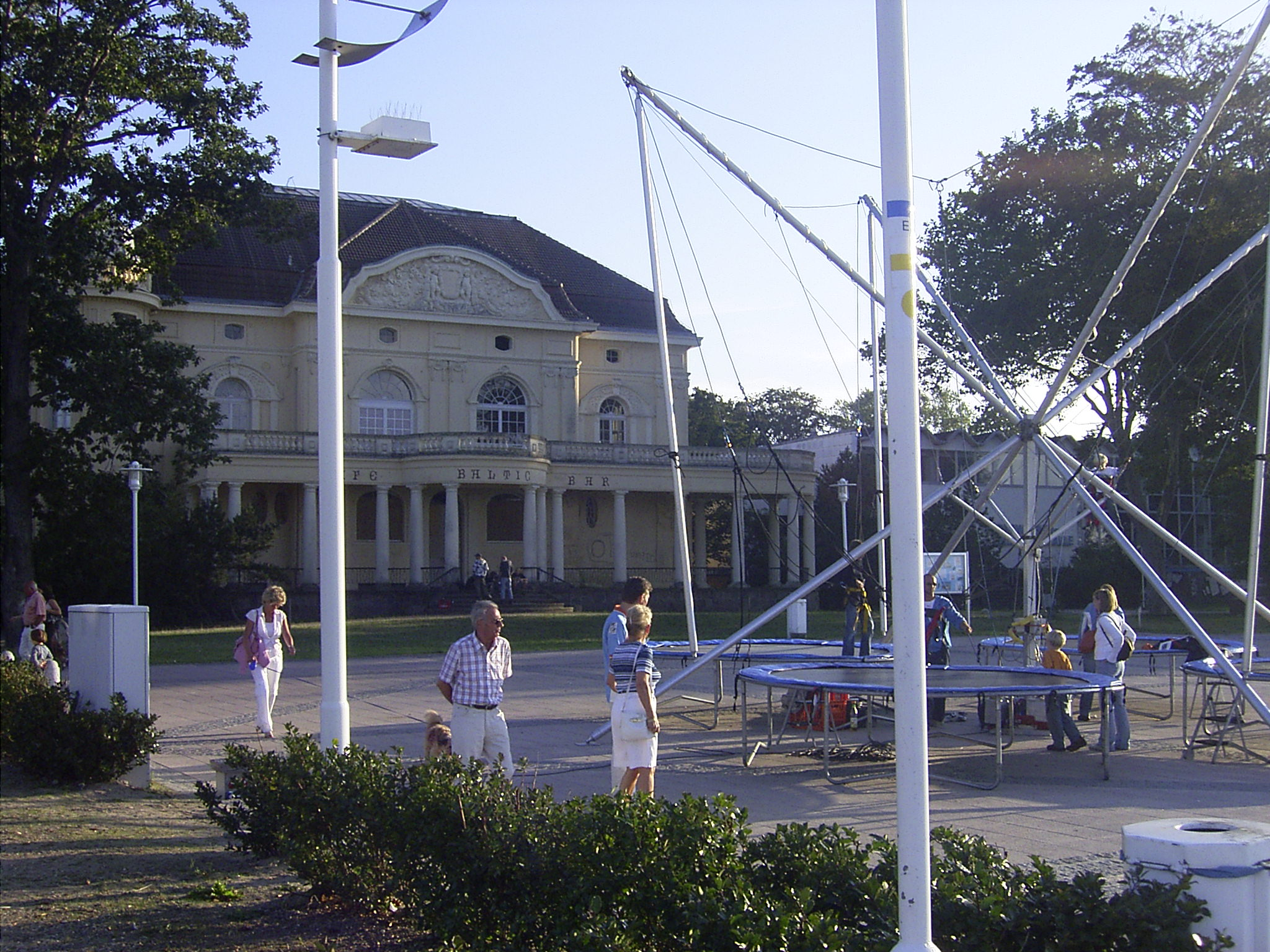 Ehemalige Villa Hausmann (später "Cafe-Baltic-Bar") von Arendsee (Kühlungsborn-West), heute leerstehend. Rechts angebaut das ebenfalls aufgegebene Meerwasserhallenbad aus DDR Zeiten.